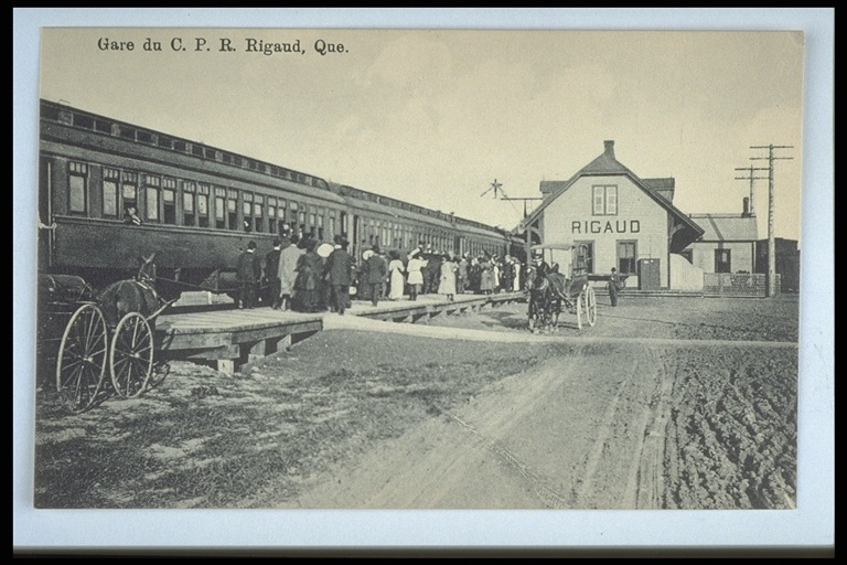 Gare de Rigaud sur une carte postale, environ 1900-1910